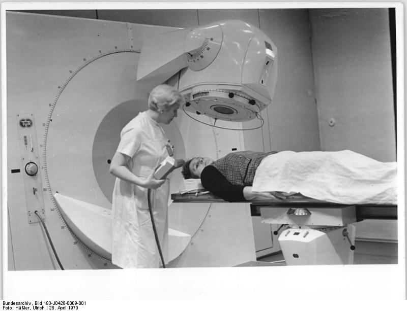 Dresden, Medizinische Akademie, Telegammagerät Zentralbild Häßler 28.4.70 Dresden: Vorbildliche Einrichtung des Gesundheitswesens der DDR. Seit einigen Monaten steht in der Medizinischen Akademie "Carl-Gustav-Carus" in Dresden ein Telegammagerät TuR T60 2000 für die Behandlung bösartiger Geschwülste zur Verfügung. Es ist das 8. Gerät dieser Art, das in den letzten Jahren in verschiedenen medizinischen Einrichtungen aufgestellt wurde. Unser Foto zeigt die med.-techn. Assistentin Lieselotte Neuhäuser bei der Einstellung des Gerätes.